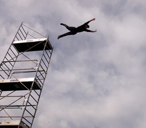 Chute de hauteur exécuté par les élèves de l'école de cascade Action Training Productions durant leur formation d'octobre 2010.